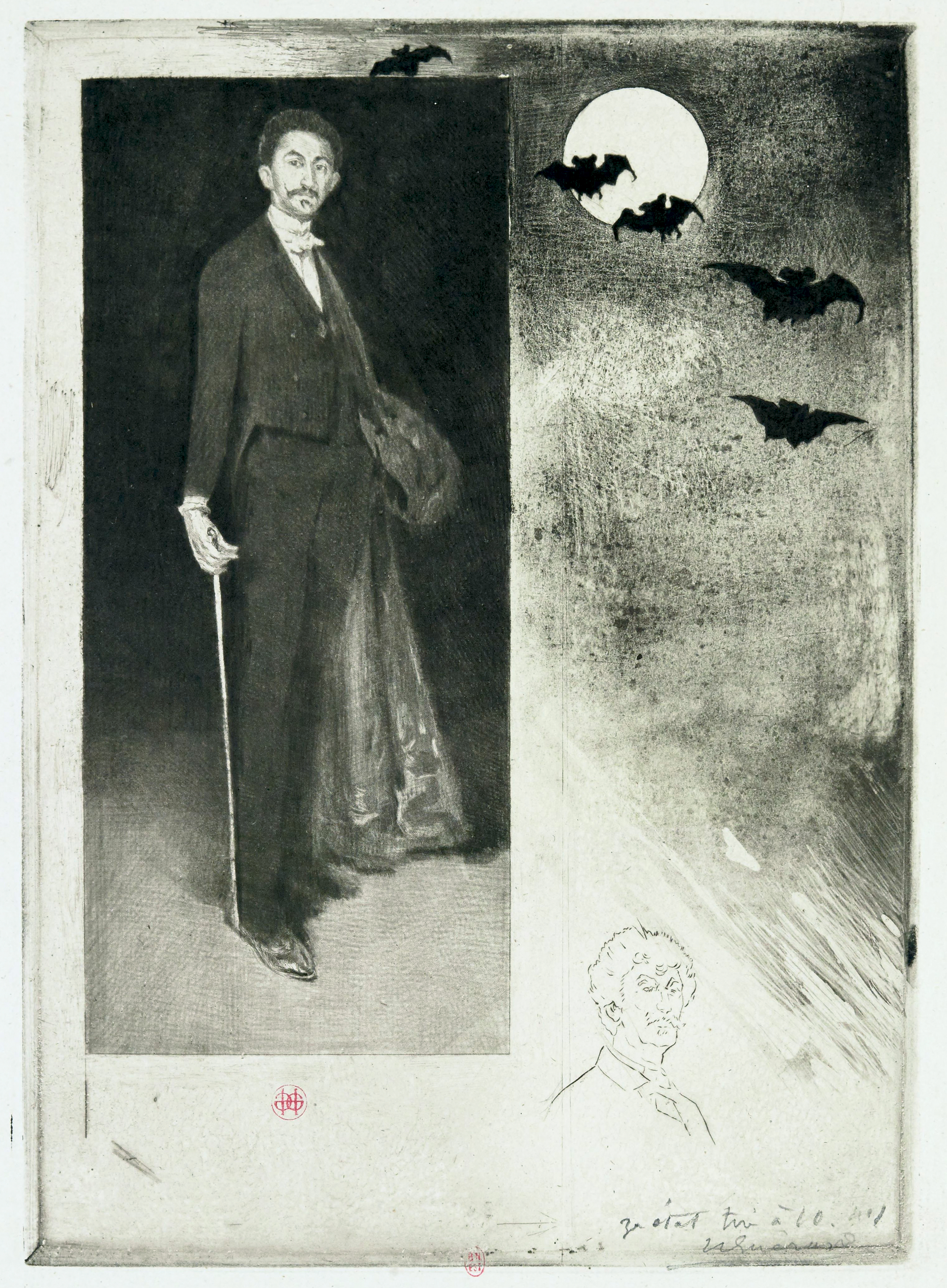 Estampe